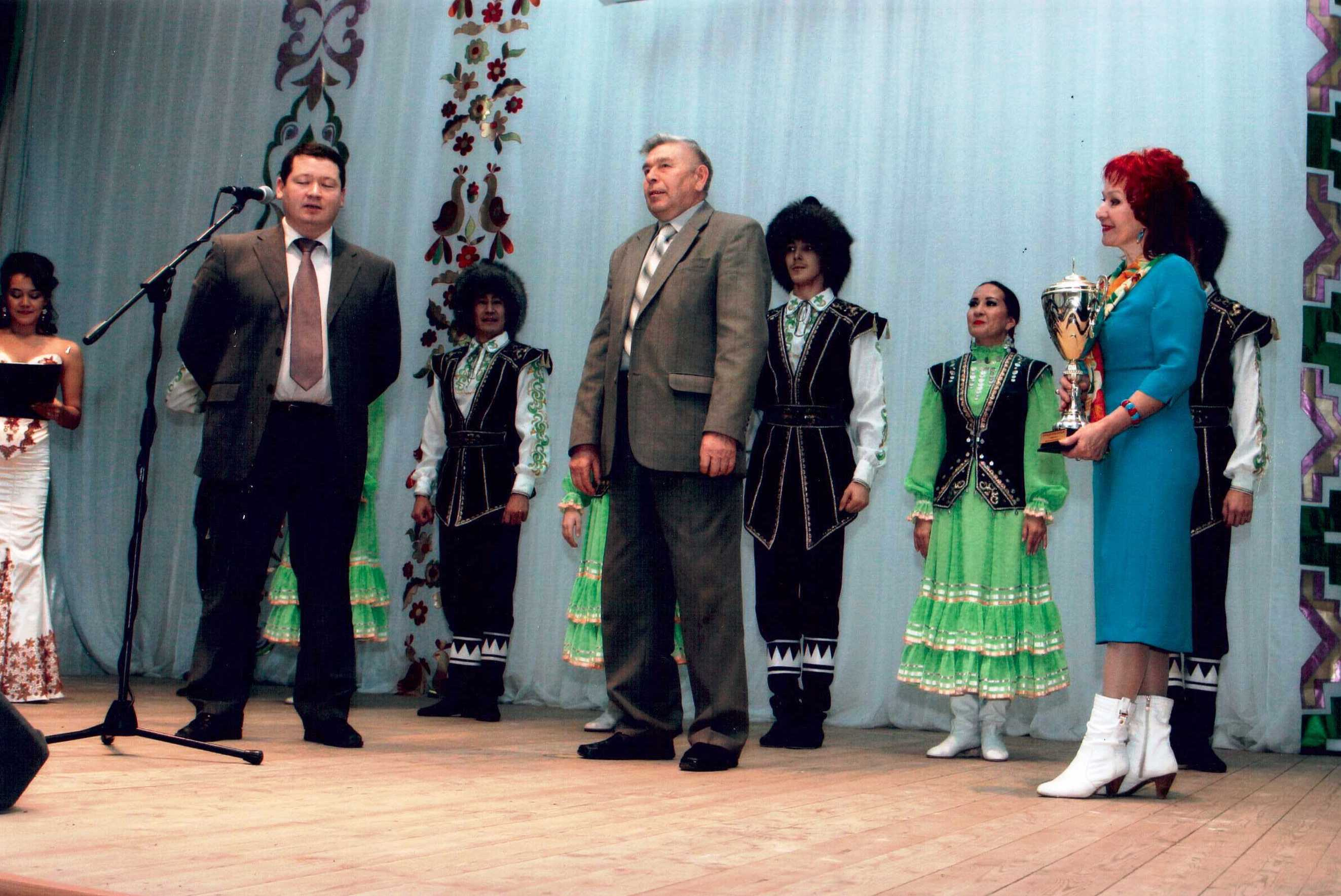 Нефтекама дәүләт филармонияһы сәхнәһендә